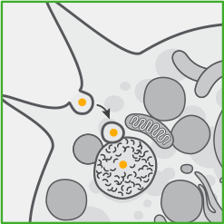 BRINEURA потрапляє в клітини-мішені і транслоціруется в лізосоми.